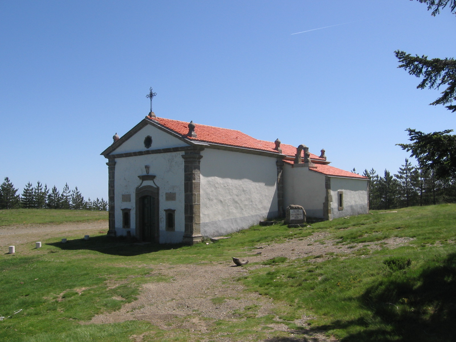 Capela de Santo António da Neve. Coentral. Castanheira de Pera. Portugal